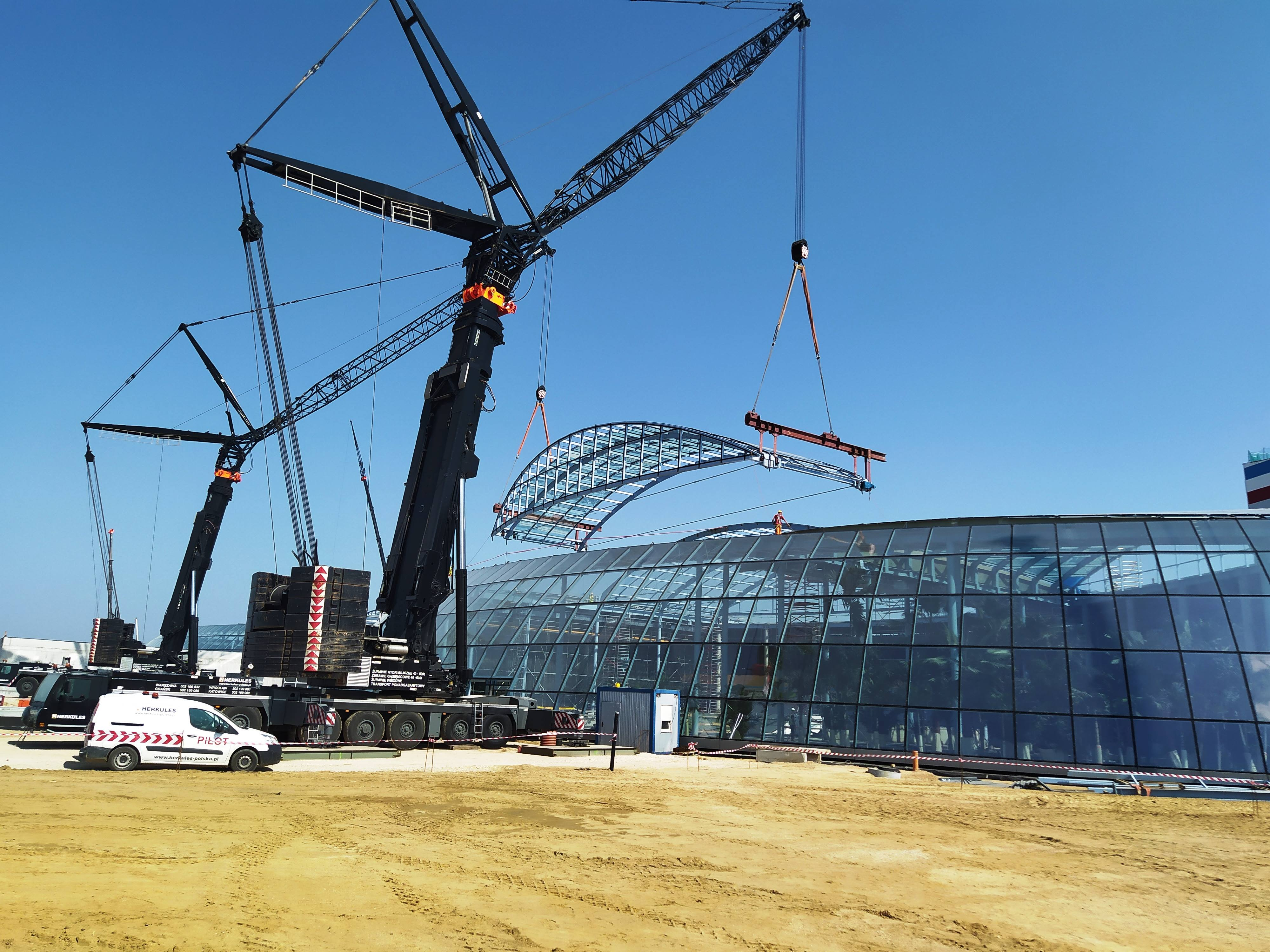 Ostatni etap budowy Suntago - pierwszego etapu Park of Poland we Wręczy, gmina Mszczonów - położenie dachu.